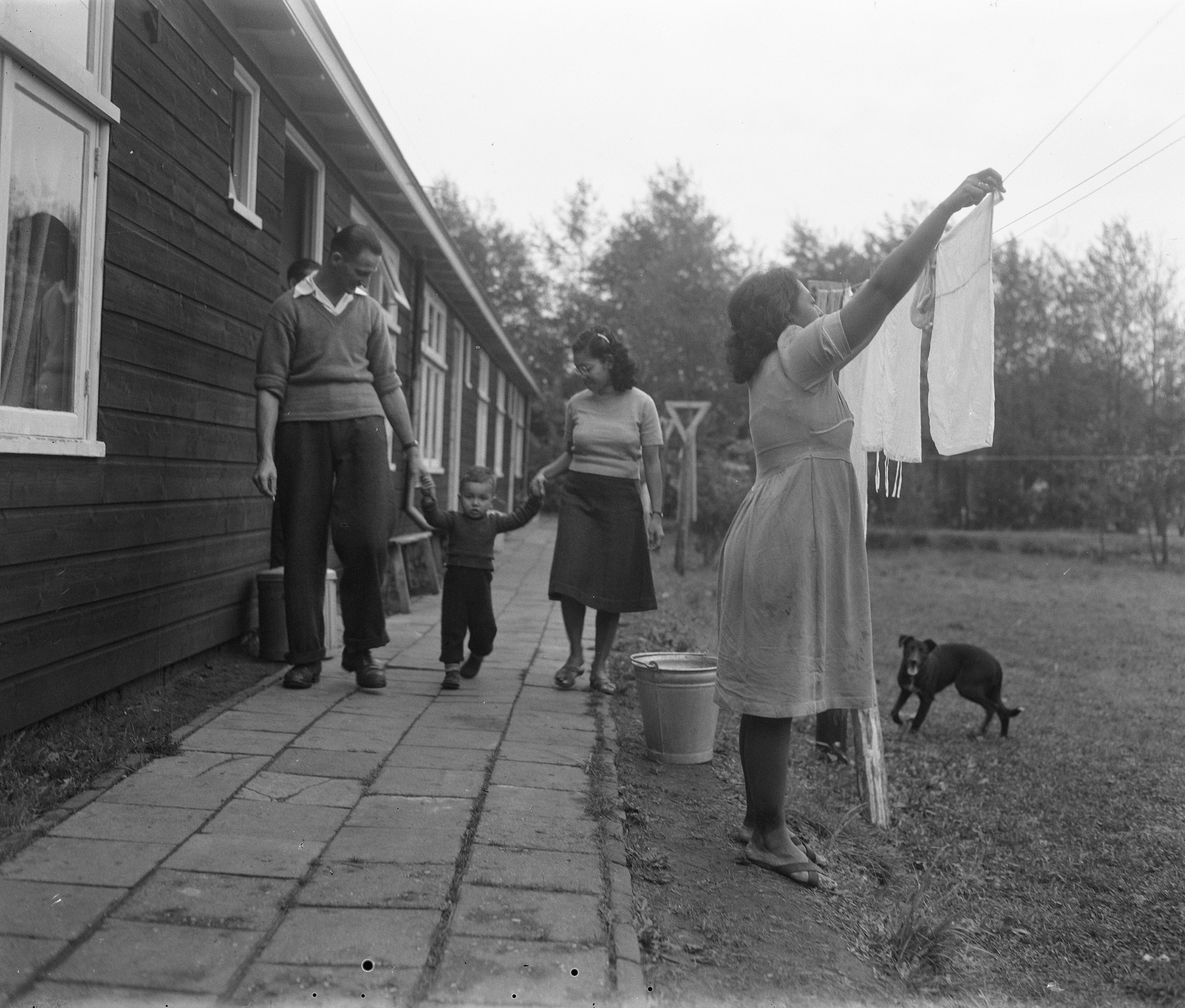 Collectie / Archief : Fotocollectie Anefo Reportage / Serie : [ onbekend ] Beschrijving : De Schattenberg Drenthe woonoord voor repatrianten Datum : 19 oktober 1950 Locatie : Drenthe, Indonesië, Indonesië Trefwoorden : repatrianten, woonoorden Instellingsnaam : Schattenberg, De Fotograaf : Winterbergen, […] / Anefo Auteursrechthebbende : Nationaal Archief Materiaalsoort : Glasnegatief Nummer archiefinventaris : bekijk toegang 2.24.01.09 Bestanddeelnummer : 904-2513